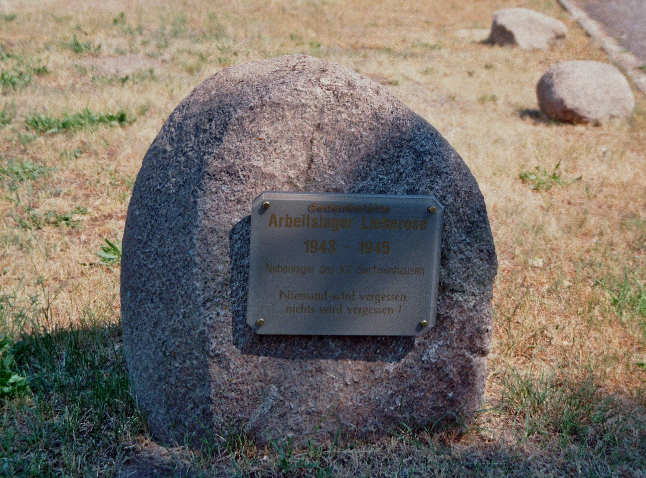 Nahaufnahme des Gedenksteins der Gedenkstätte Arbeitslager Lieberose 1943-1945 neben dem Friedhof in Lieberose, Landkreis Dahme-Spreewald, Brandenburg, Deutschland. Der Text auf der Tafel lautet: „Gedenkstätte Arbeitslager Lieberose 1943-1945 — Nebenlager des KZ Sachsenhausen — Niemand wird vergessen, nichts wird vergessen!“